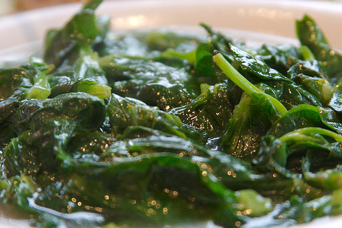 Cantonese stir fry vegetableCantonese stir fry vegetable